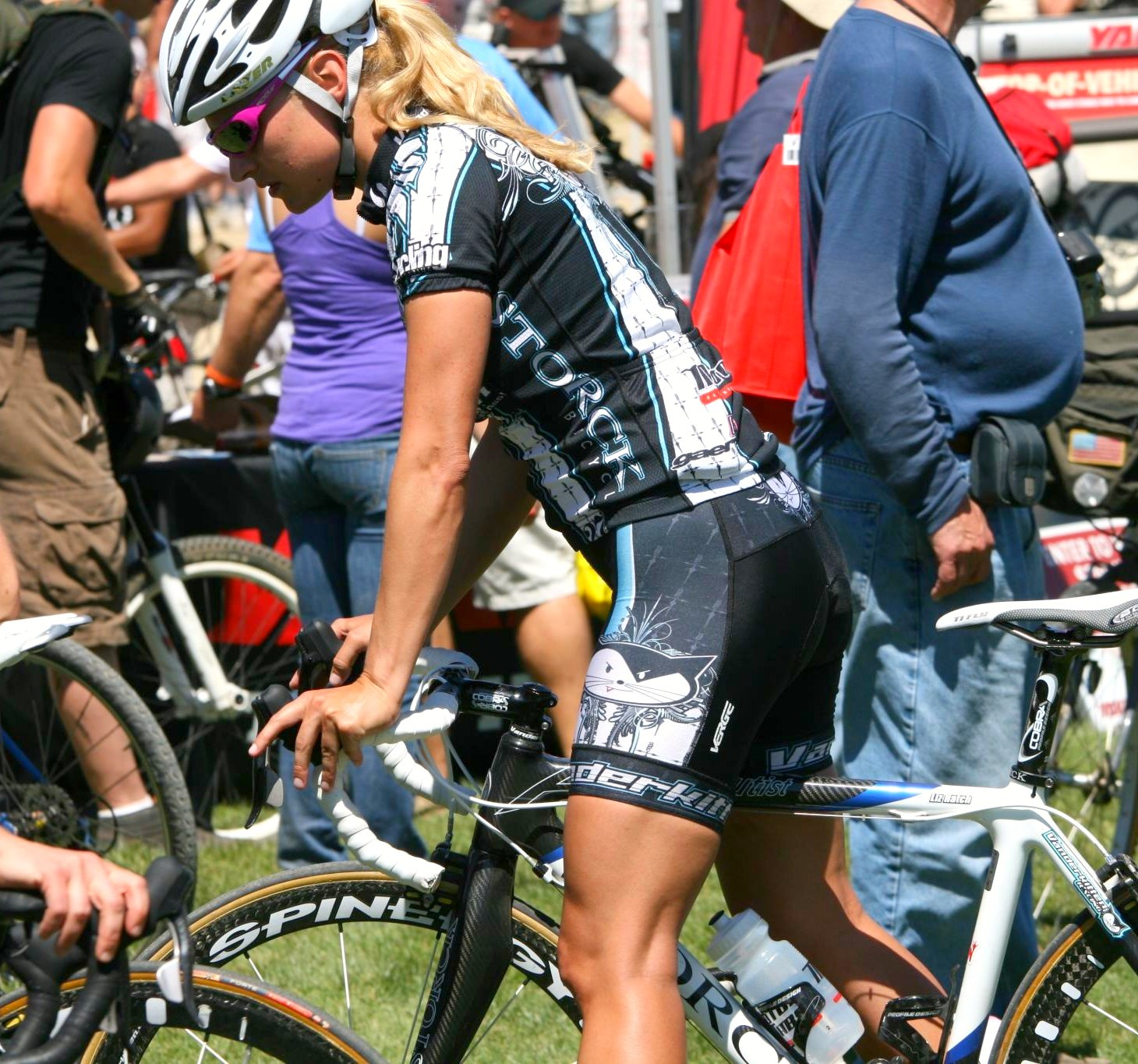 Liz Hatch